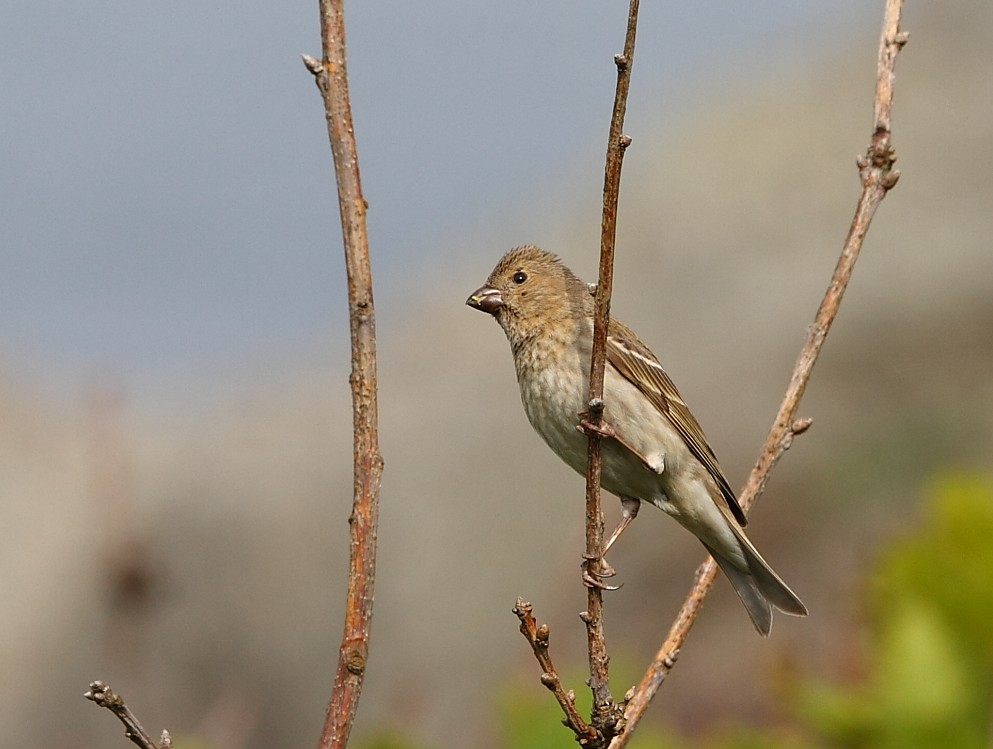 Common Rosefinch female, from Lista, Norway.